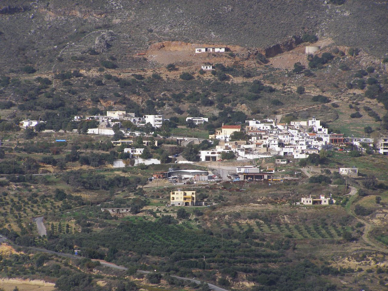 Asomatos in der Präfektur Rethymno, Kreta, von Süden fotografiert